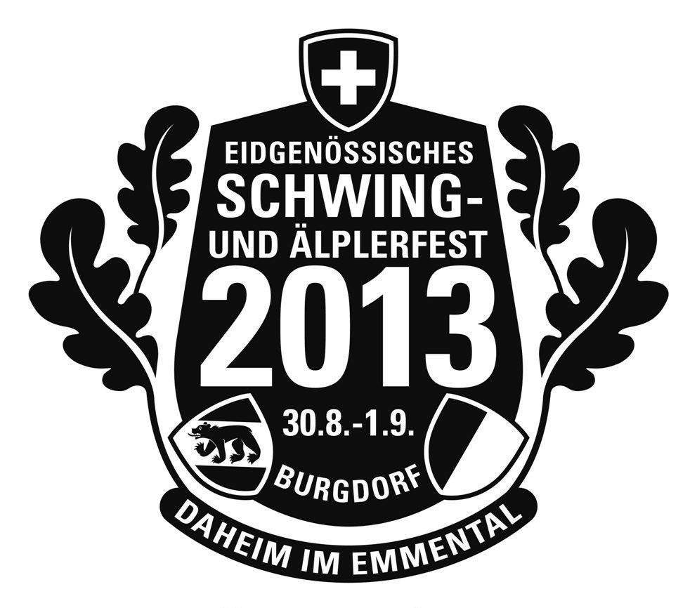 Logo Eidg. Schwing- und Älplerfest 2013, Burgdorf BE, Schweiz